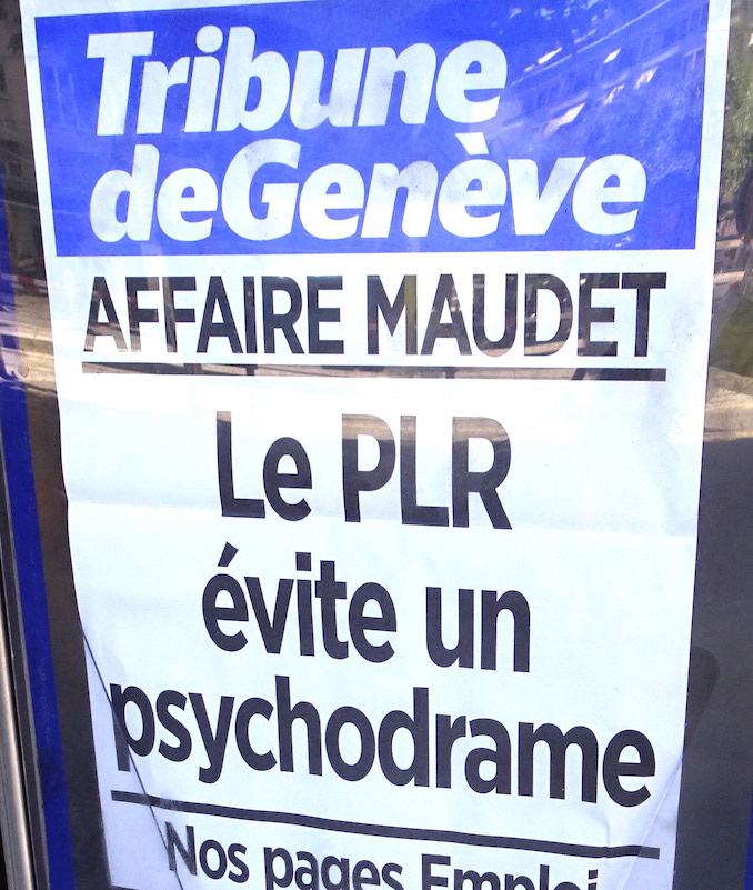 À la suite de l'éviction de Pierre Maudet de son parti (PLR) à Genève, quand Pierre Maudet renonce à faire recours de cette décision.